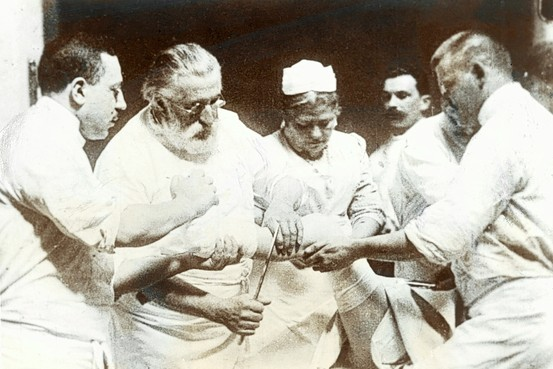 Ernst von Bergmann bei der Beinamputation von einem Diabetespatienten (1897)